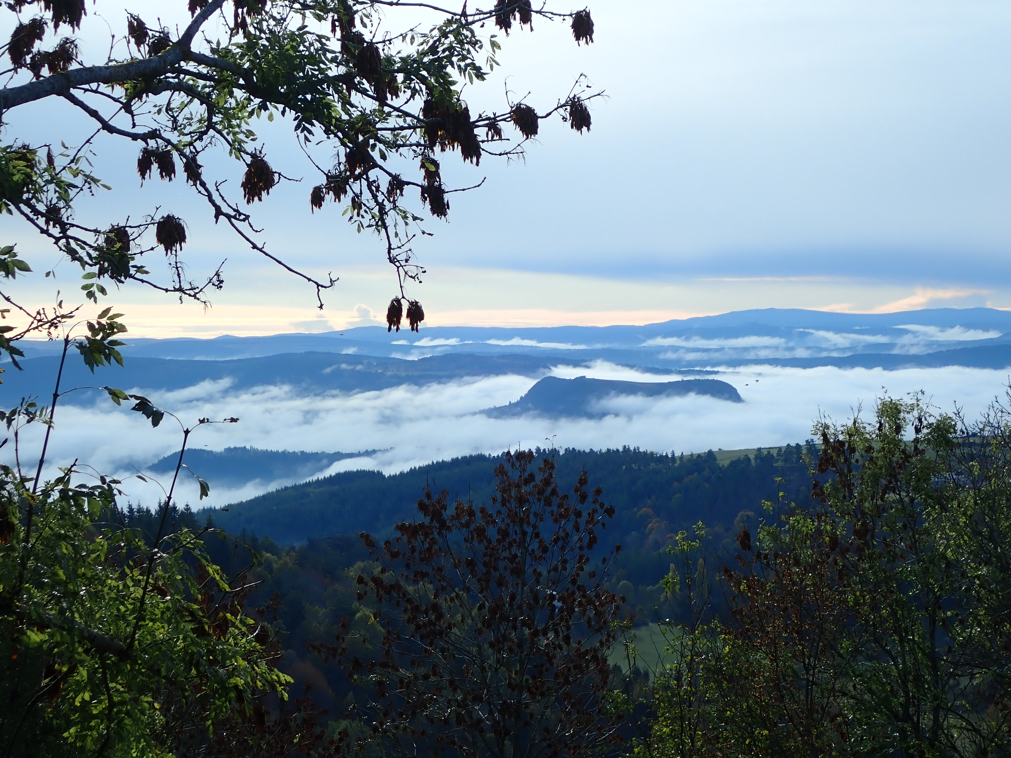 Mer de nuage dans la vallée de la Colagne (Lozère, Massif central, France). Vue prise de l'hôtel du Chalet à 1 100 m d'altitude sur les premières pentes de l'Aubrac. On distingue les plateaux des Causses et les Cévennes à l'horizon (mont Aigoual en particulier). Le sommet qui émerge des nuages est le truc de saint-Bonnet (altitude : 942 m).